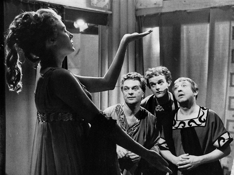 Die schöne Galathee = Den sköna Galathea. Operett av Franz von Suppé